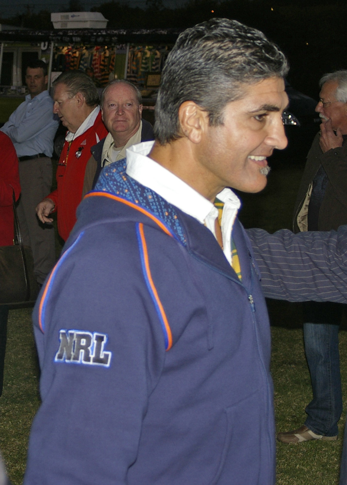 Mario Fenech